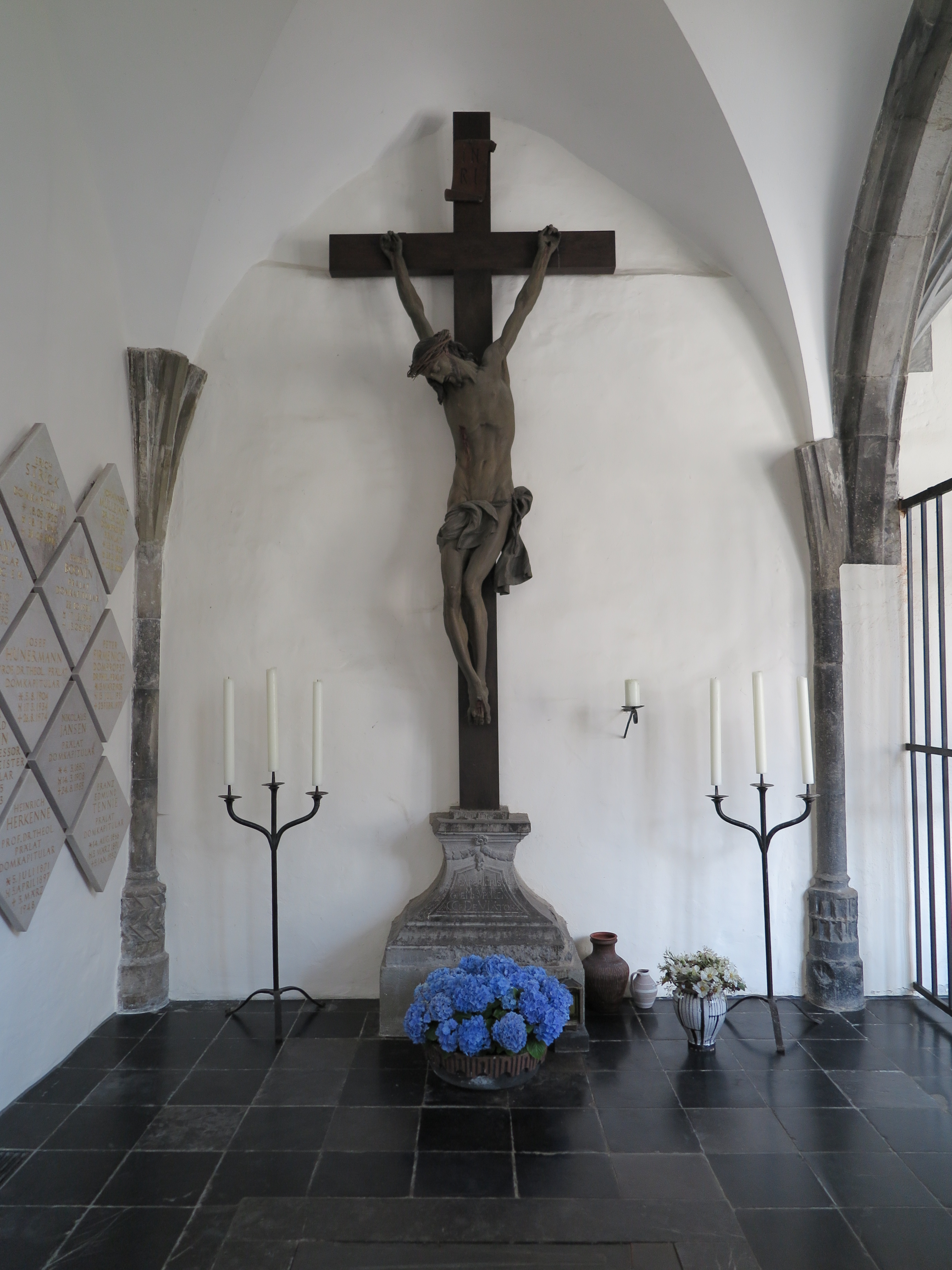 Grupello Kreuz im südlichen Kreuzgang des Klostergebäudes am Aachener Dom.